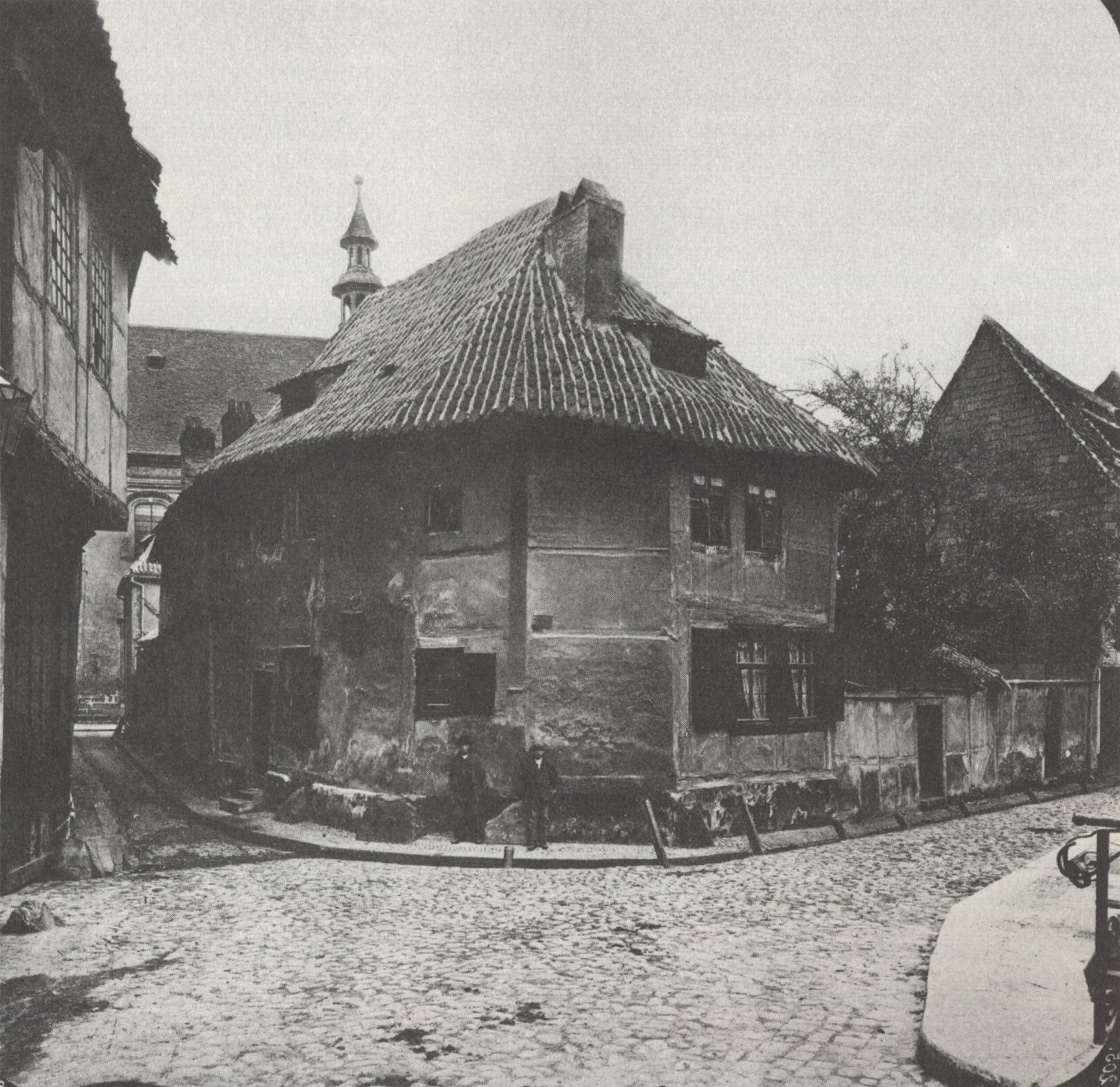 Haus Wordgasse 3 in Quedlinburg